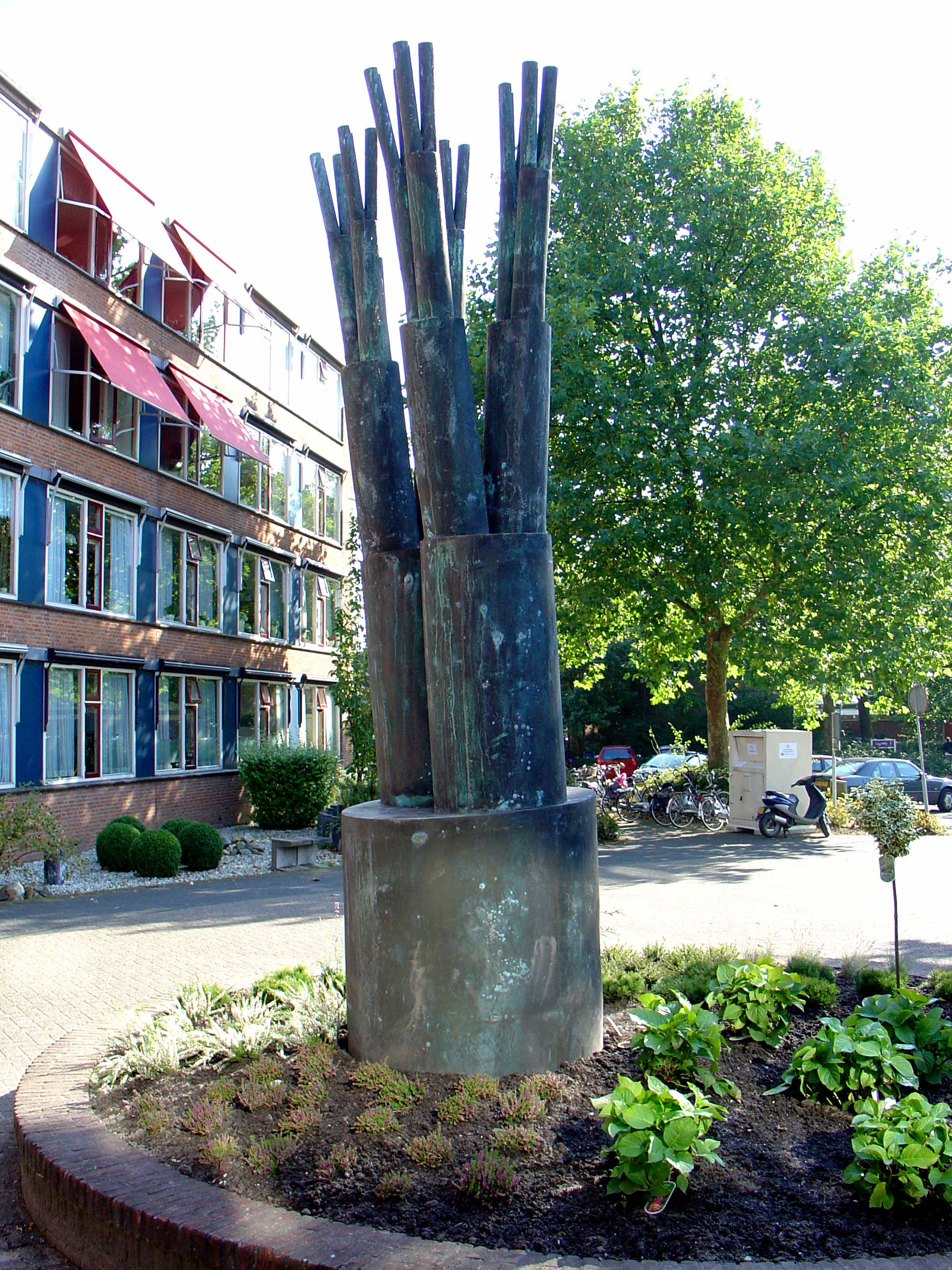 Beeld bij de "Breeje Hendrick" in Lekkerkerk door Sjoerd Buisman